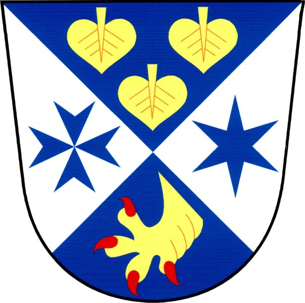 Znak obce Skalka u Doks